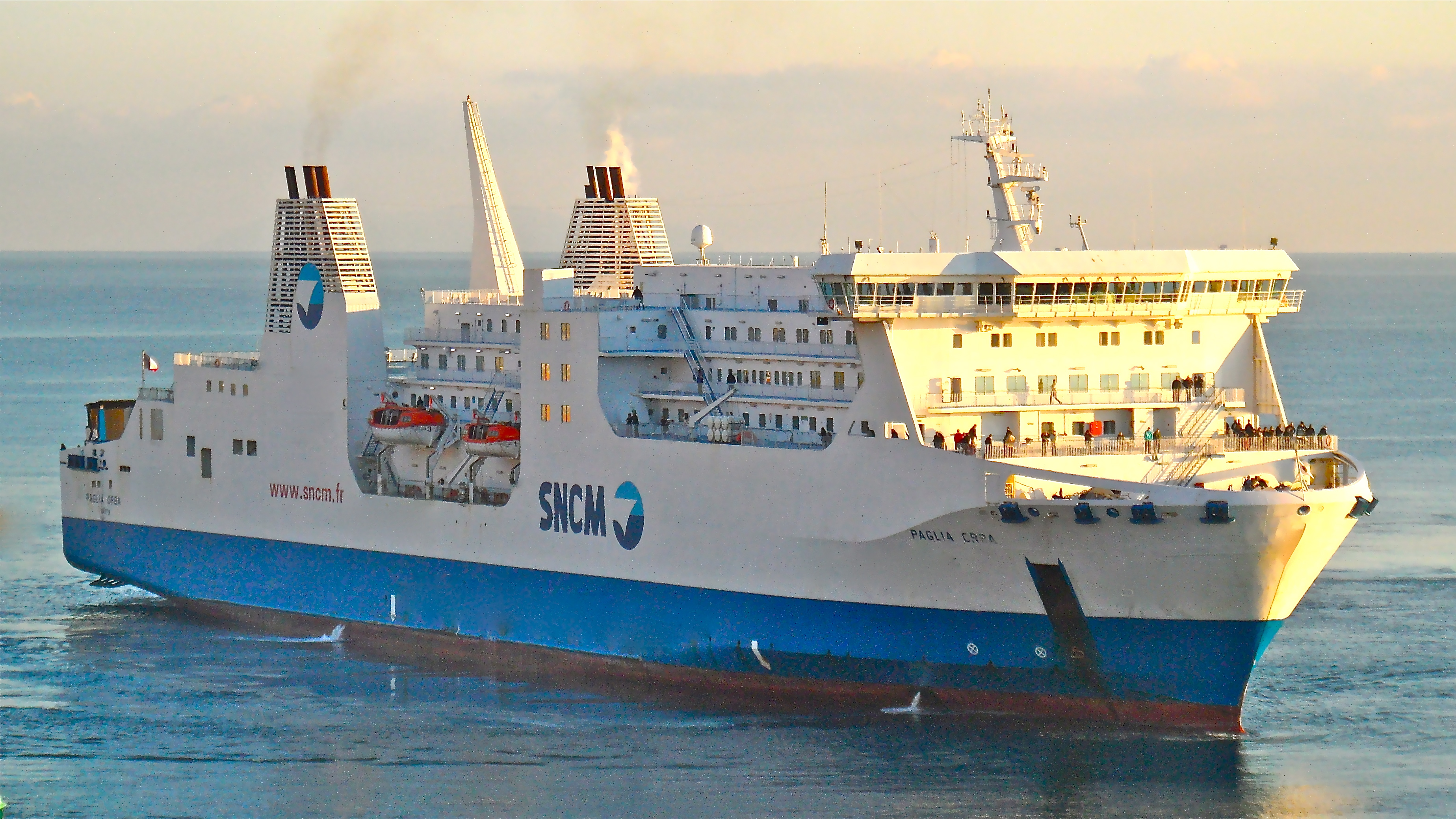 le Paglia Orba, navire mixte de la SNCM à Bastia, assez tôt le matin.